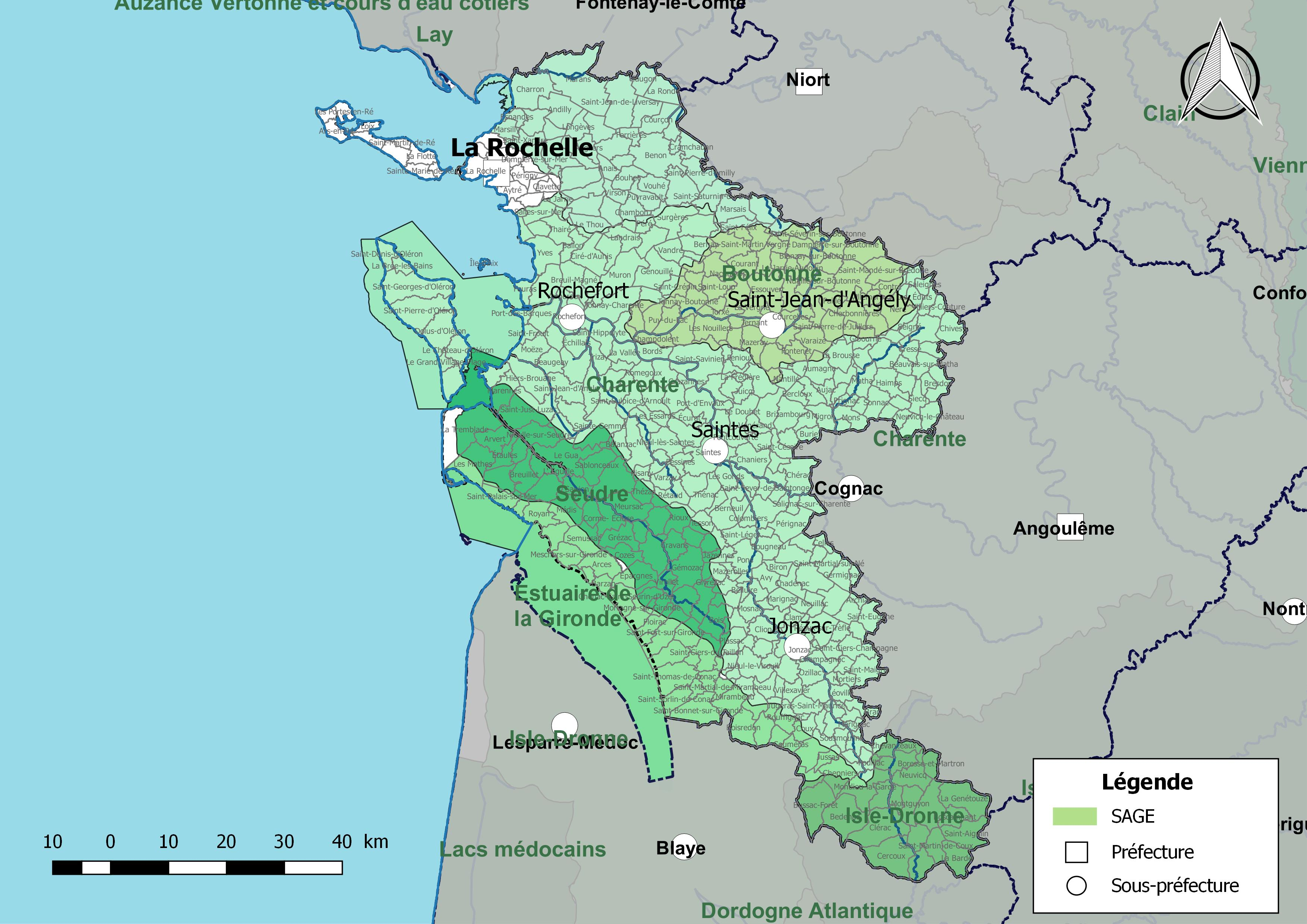 Carte des schémas d'aménagement et de gestion des eaux (SAGE) concernant le département de la Charente-Maritime (France) au 1er janvier 2018.